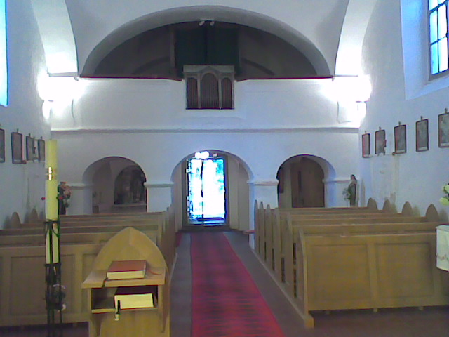 A tiszasülyi Szent László-templom